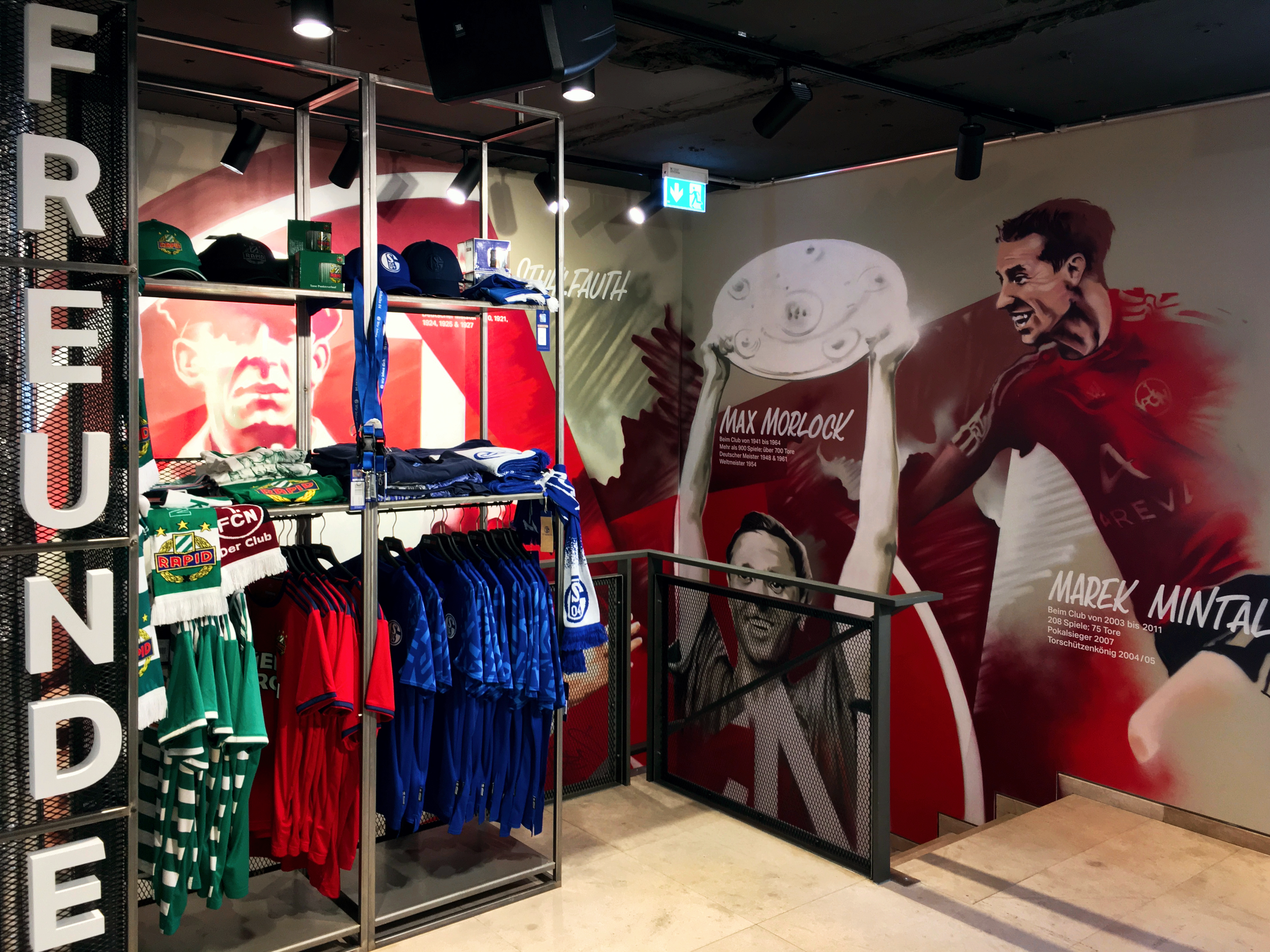 Freundschaftsecke im Clubhaus am Jospehsplatz in Nürnberg